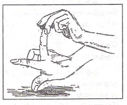 Marble play கோலிக்குண்டு is an indigenous game in India, famous up to 1950. Source is scanned from the book “vanishing games of Tamil Nadu” மறைகின்ற விளையாடுகள் published in 2002. The author of the book is the up-loader